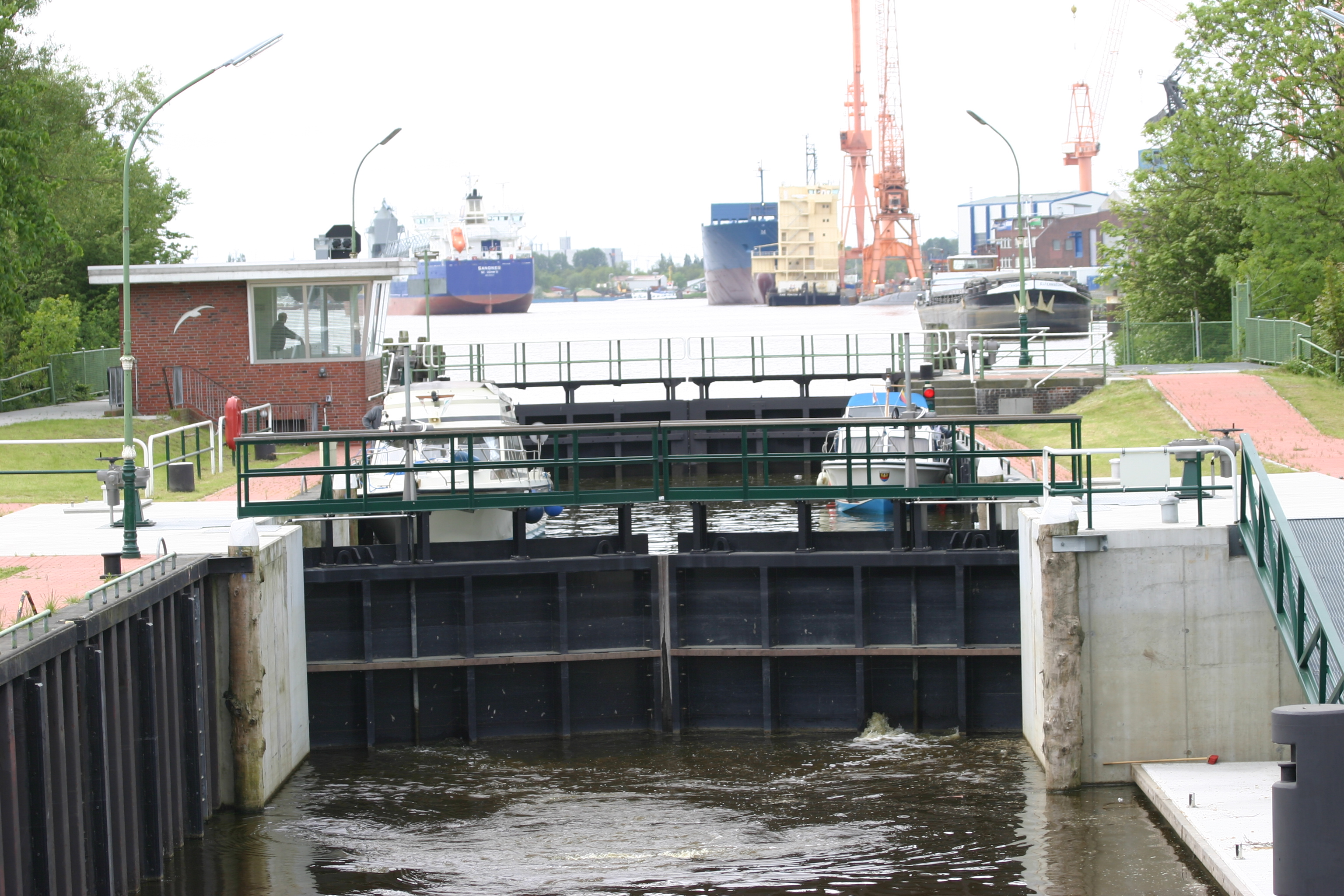 Die Borssumer Schleuse in Emden, Ostfriesland, Niedersachsen, im Hintergrund ein Teil des Hafens